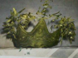 Sebuah siger berlapis emas, milik kepaksian buay belunguh